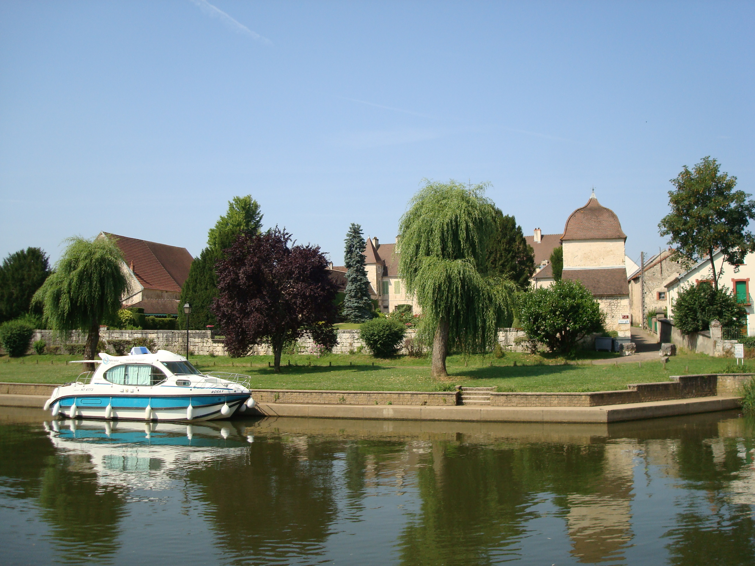 Halte nautique de Mantoche (Haute-Saône, France)